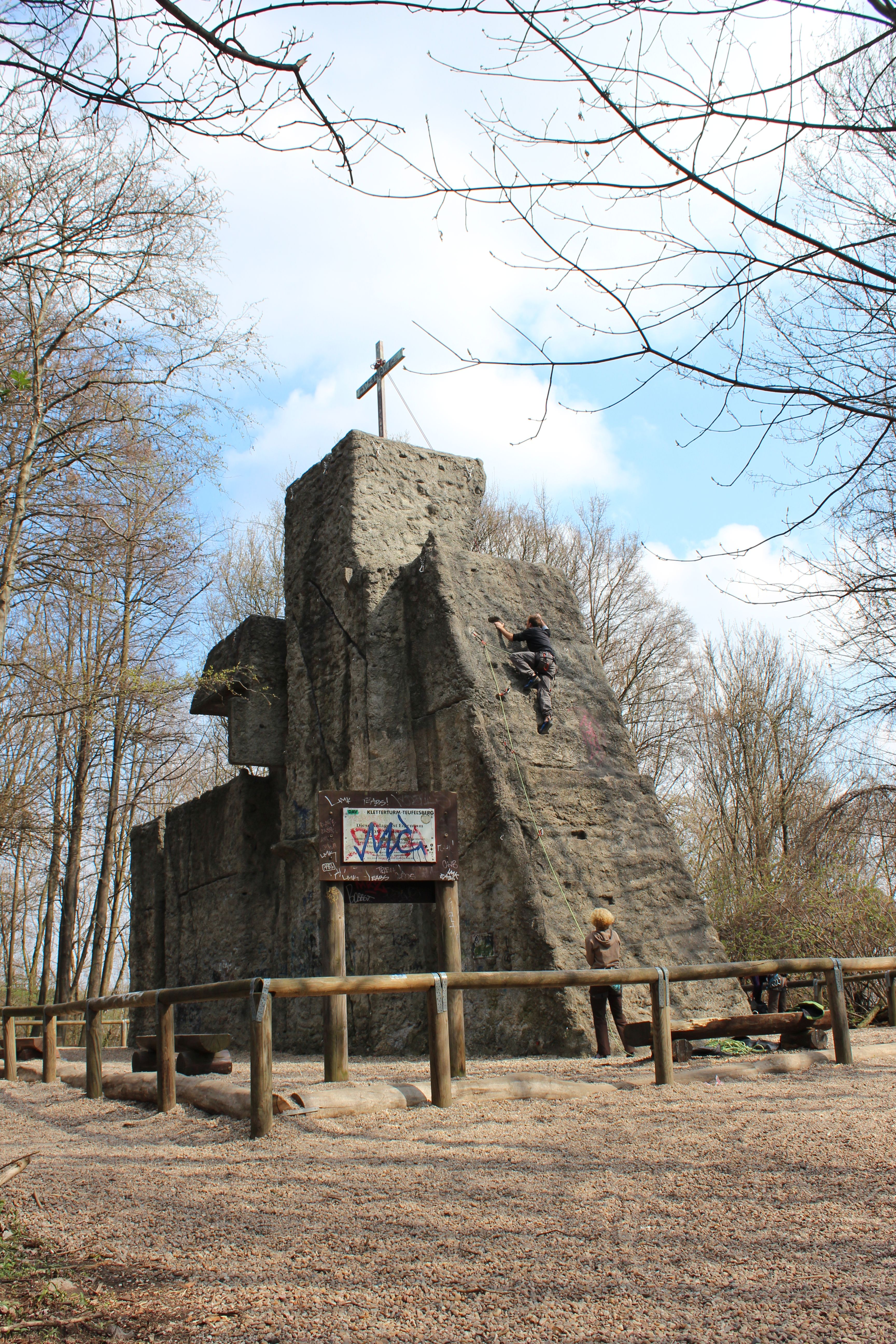 Der Kletterturm auf dem Berliner Teufelsberg, fertiggestellt 1974, war der zweite Kletterturm in Deutschland. Ein fast identische Kopie steht in der peruanischen Hauptstadt Lima.